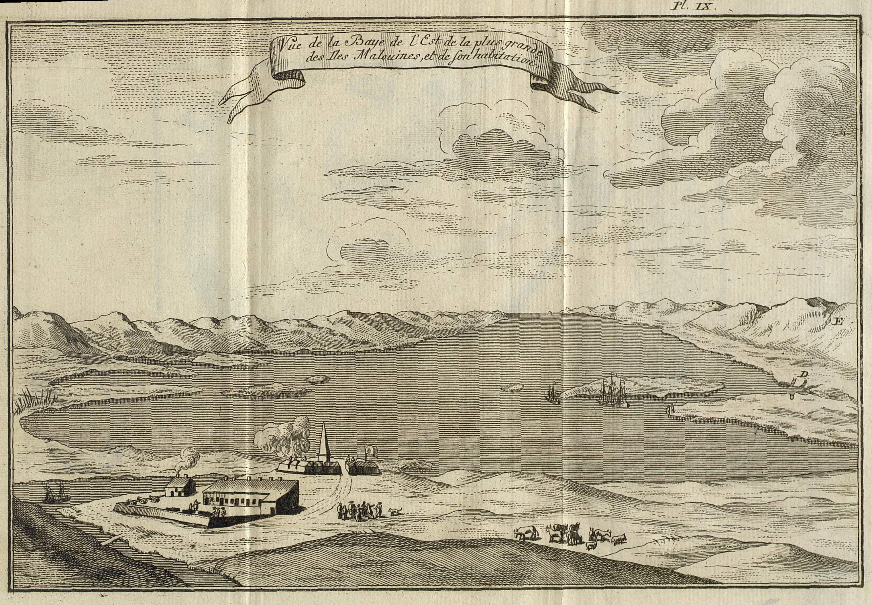 Autor: Pernety, Antoine-Joseph, 1716-1796 Descripción bibliográfica: Histoire d'un voyage aux Isles Malouines, fait en 1763 & 1764 : avec des obseruations sur le detroit de Magellan et sur les Patagons /par Dom Pernety ... ; tome premier [-second] . - Nouuelle édition, refondue & augmentée ... - A Paris : chez Saillant & Nyon .... : Delalain ... : de l'imprimerie de Le Breton ..., 1770 . - 2 v. (I: IV, 385 p., [1] p. en bl. ; II: [2], 334 [2] p., XVI [i.e. XVIII] h. de grab. pleg.) ; 8º Notas: Nombre del tercer impresor tomado del colofón del t. 2. - Sign.: I: ², A-2A⁸, 2B² ; II: ¹, A-X⁸. - Error de numeración de las h. de grab., se repiten las VIII y IX. - Las h. de grab. pleg. son calc. con mapas, animales, plantas ... Impresor: Nyon, Jean Luc, imp. Impresor: Saillant, Charles,1716-1786, imp. Impresor: Delalain Nicolas-Augustin, ca 1735-1807, imp. Impresor: Impreimerie de Le Breton, imp. Lugar de impresión: Francia. París Localización: Vea la ilustración en su contexto Libro completo en pdf